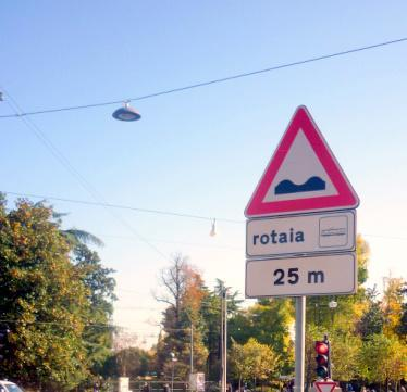 segnaletica per avvertire della rotaia